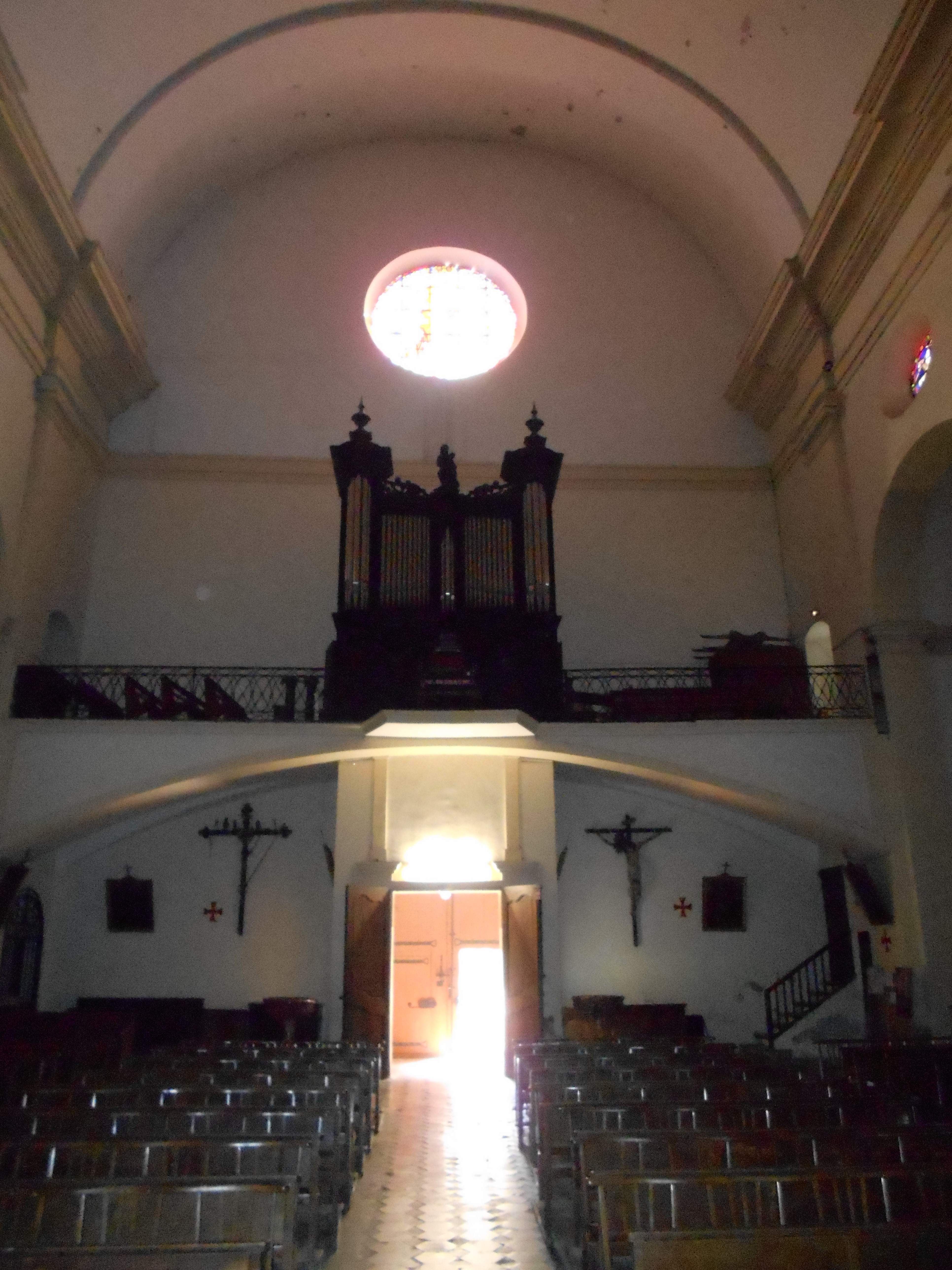 Església parroquial de Tuïr